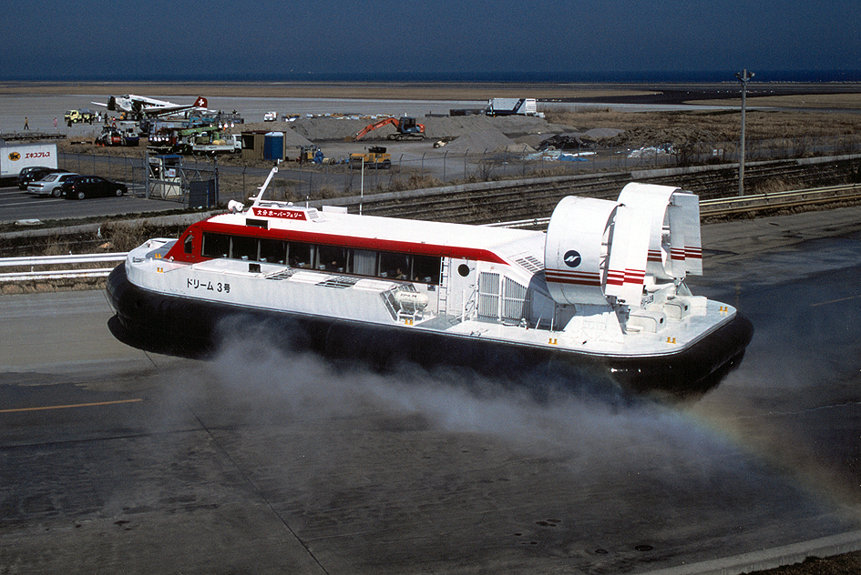 JU-AIR ユンカース JU52 3m HB-HOS と大分ホーバーフェリー ドリーム3号